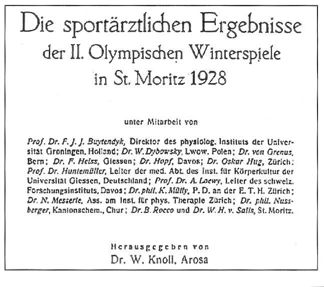 Titelblatt der unter Quelle genannten Publikation